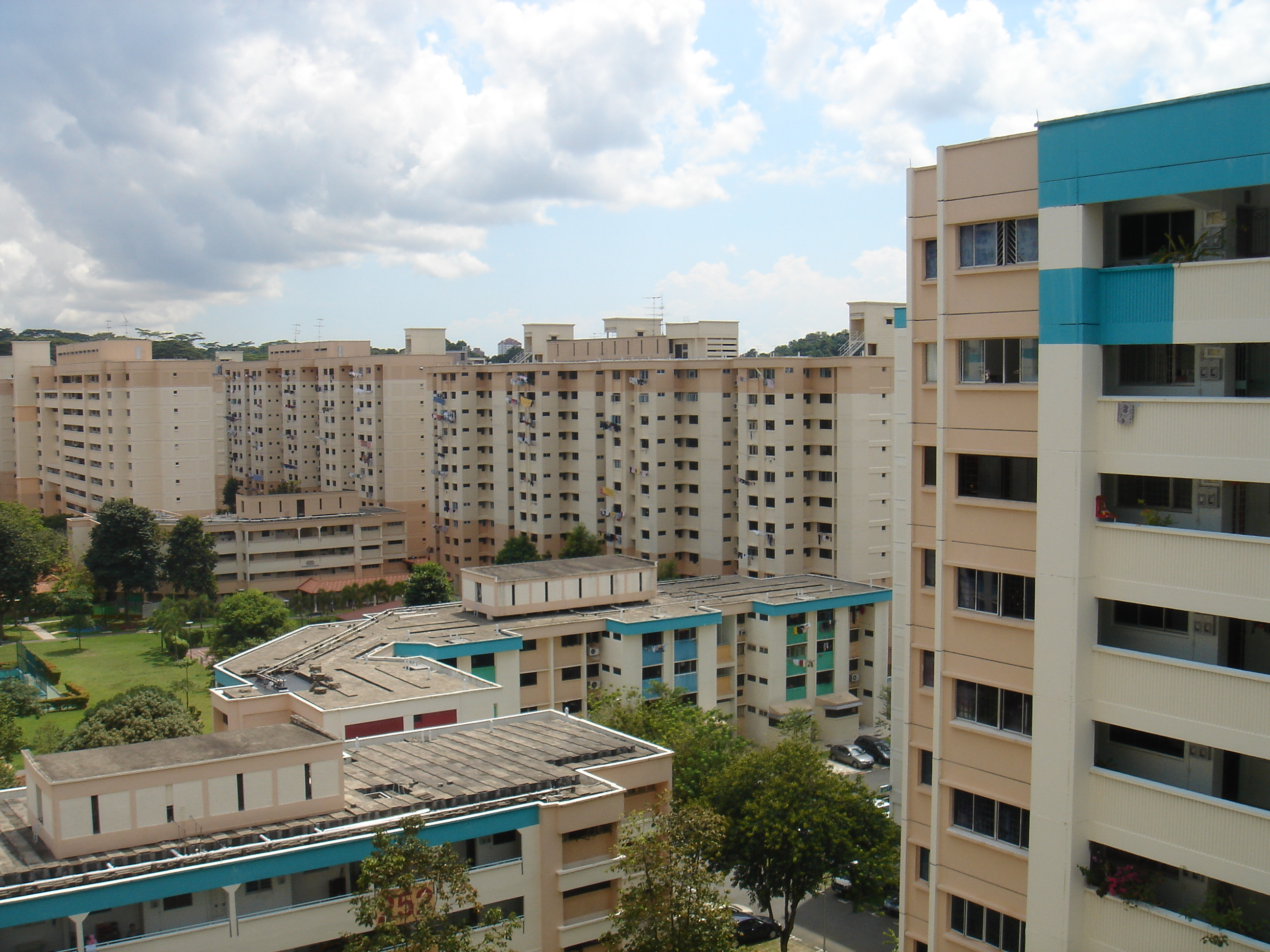 Housing estate at Bukit Batok East, Bukit Batok, Singapore.